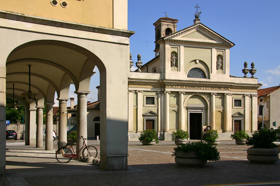 Piazza Martiri della Libertà a Vespolate (NO) con i portici del municipio e la chiesa parrocchiale.